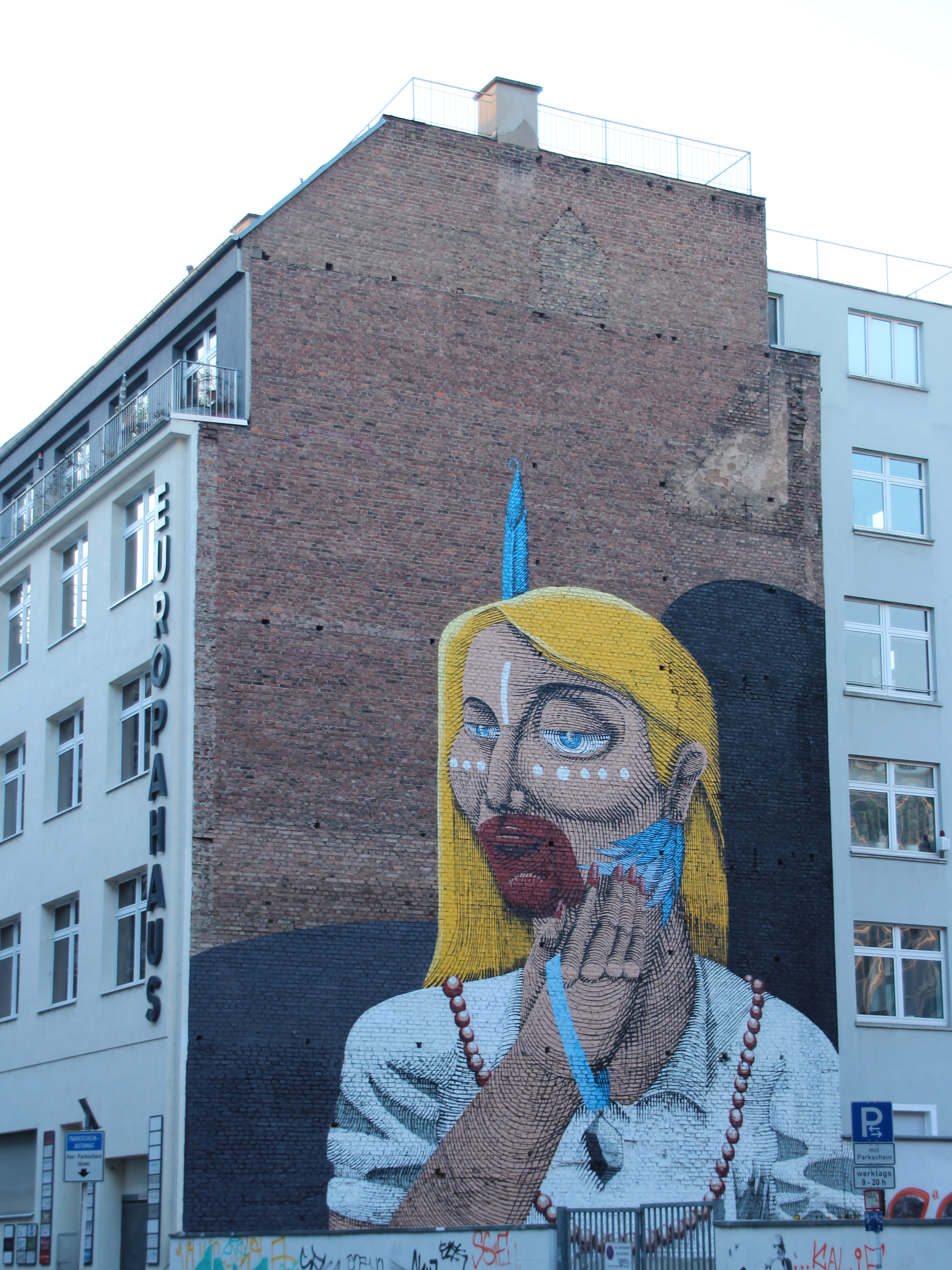 Bildinhalt: Niddastraße, Europahaus, Gemälde auf der Giebelwand nach Nordosten. Das Bild entstand 2013. In diesem Jahr holte die Schirn brasilianische Graffity-Künstler nach Frankfurt. Nunca führte mit diesem Bild ein Mural aus Sao Paulo fort. Aufnahmeort: Frankfurt am Main, Deutschland